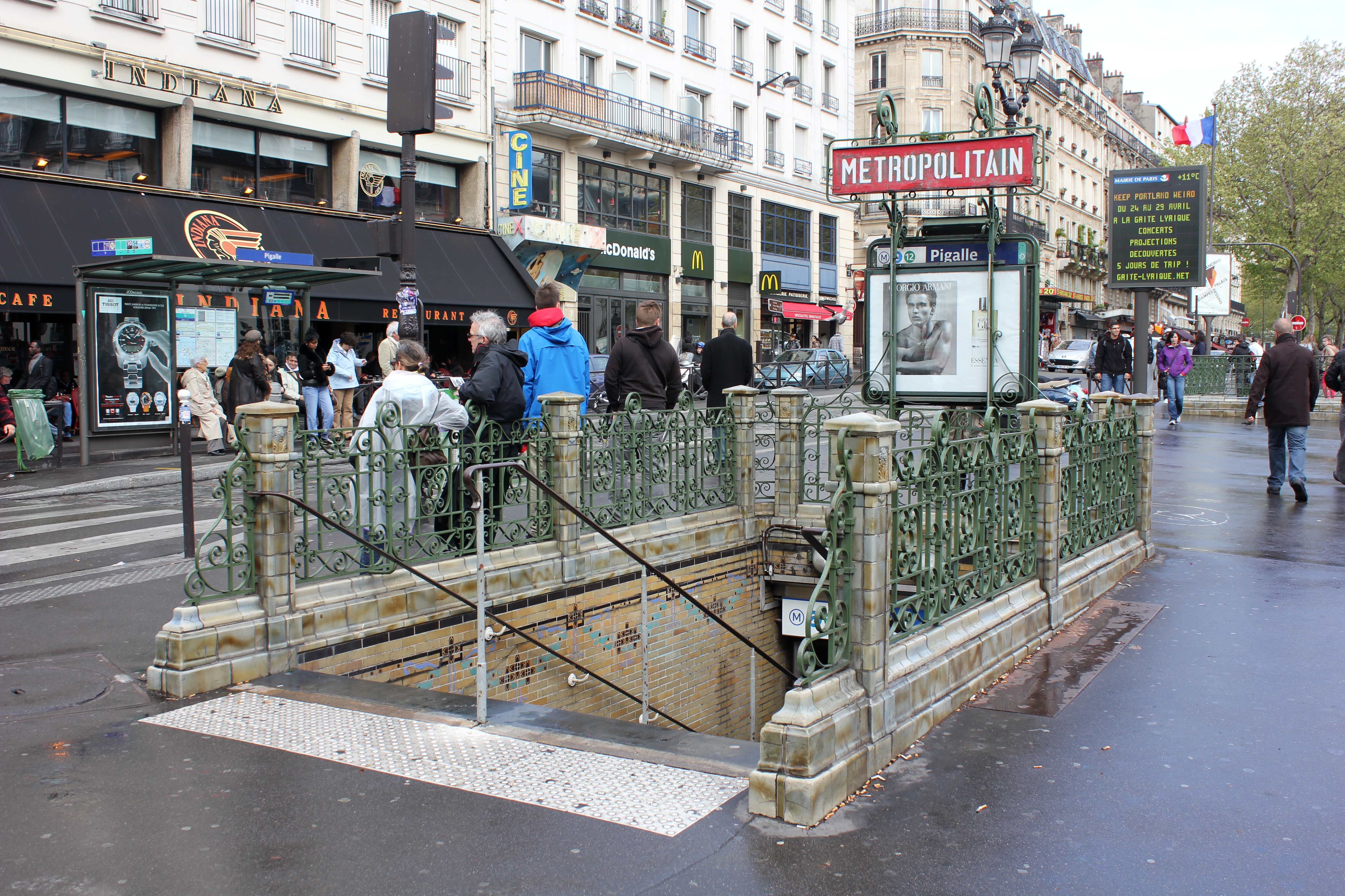 Paris Metro 12 Pigalle Eingang West